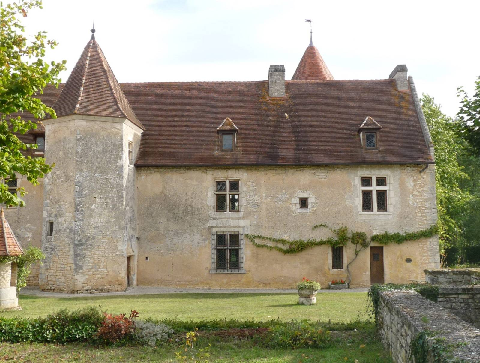 château de Chenon, Charente, France